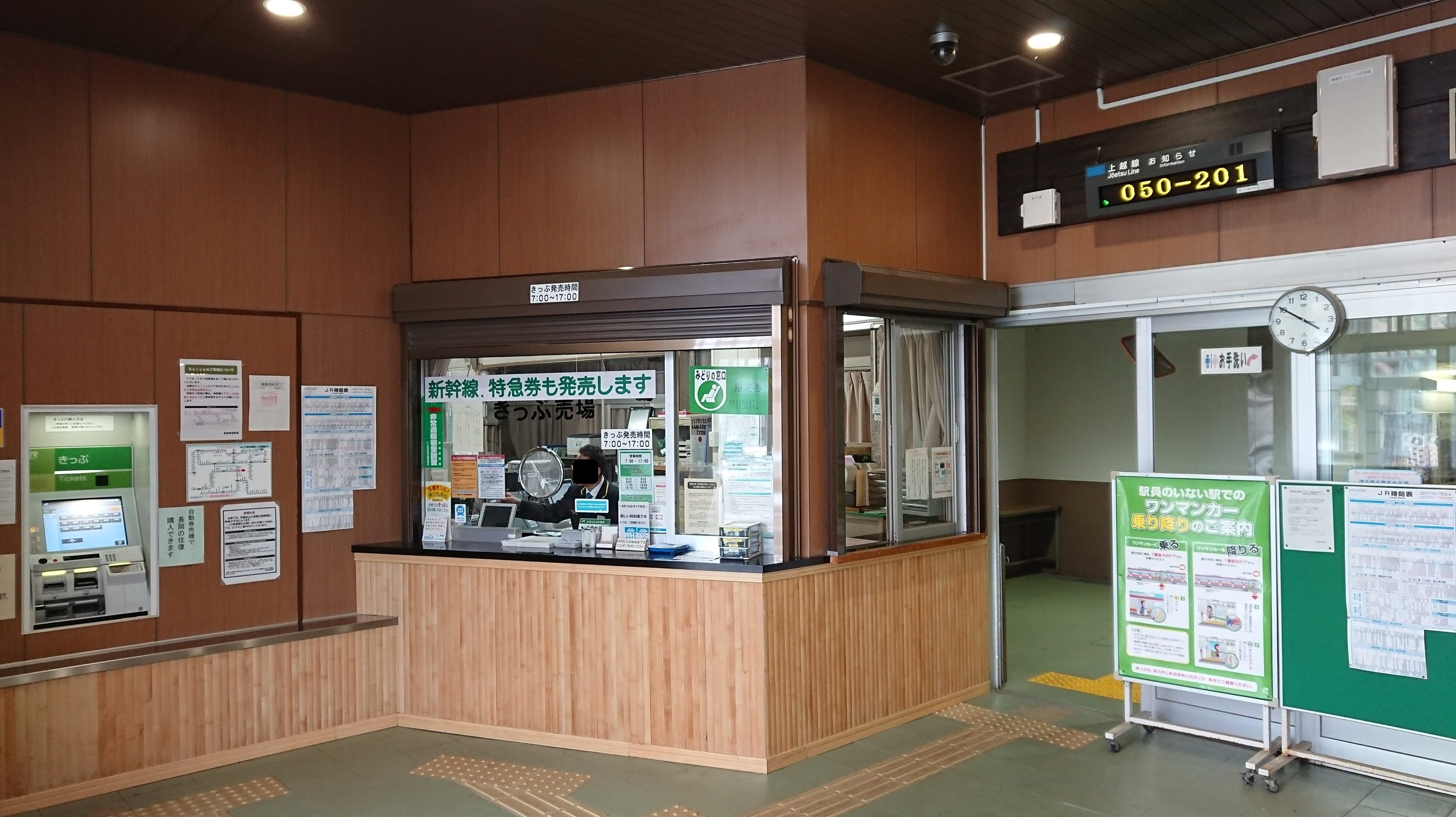 越後川口駅のコンコース